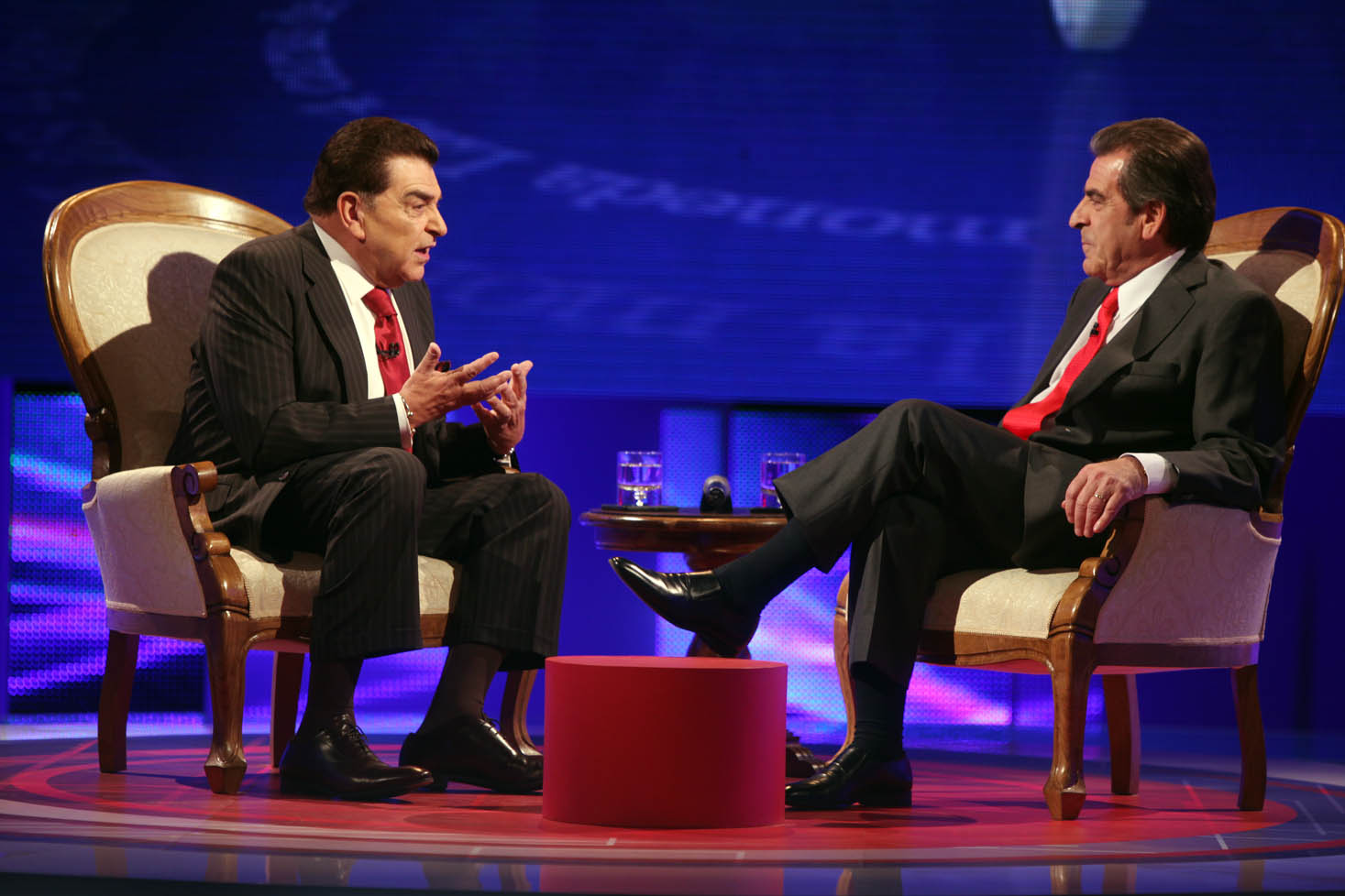 Eduardo Frei con Don Francisco en el programa televisivo "Las cuatro caras de la moneda".